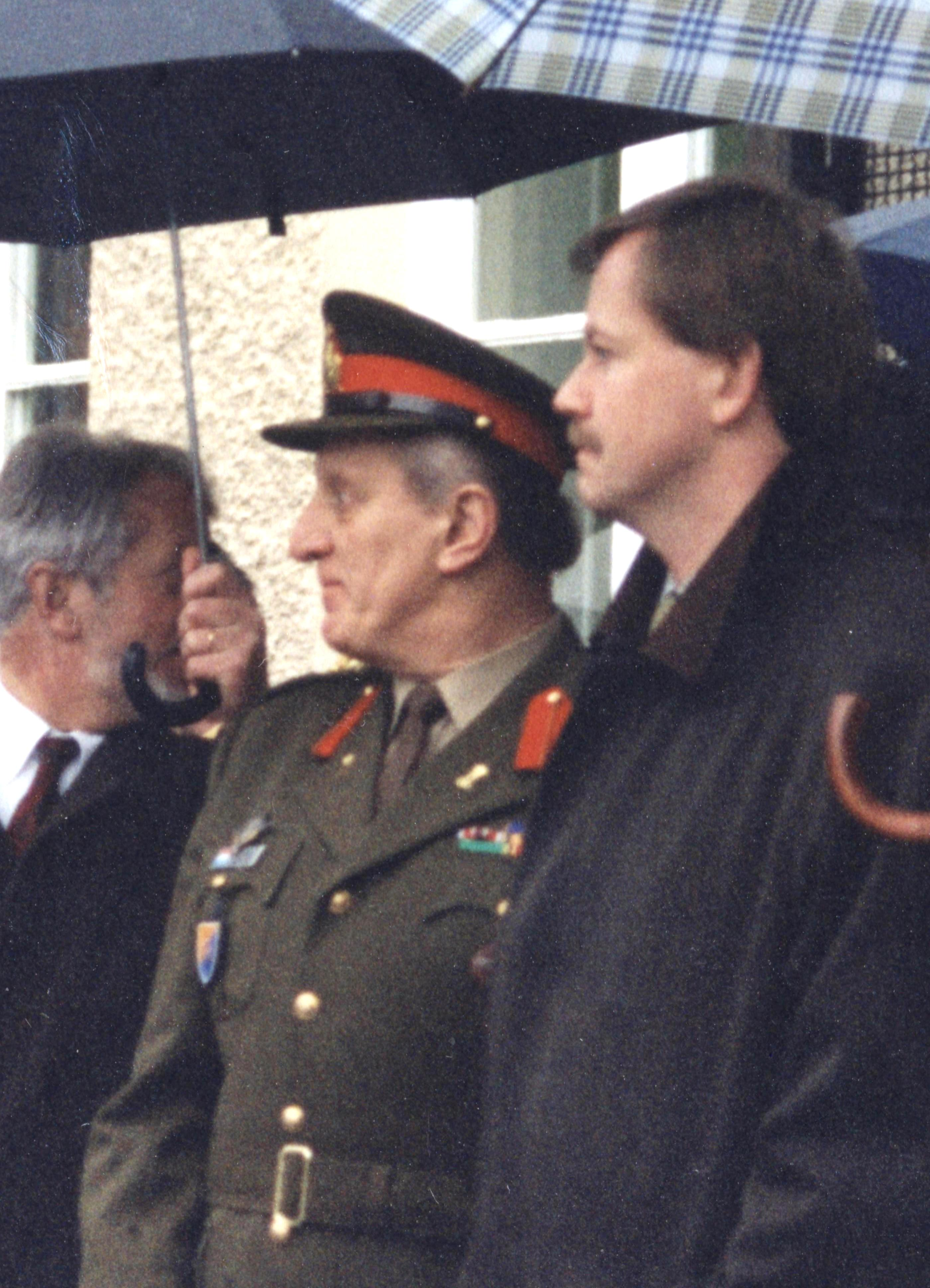 Den Alex Bodry op enger Vereedegung um Härebierg nieft dem deemolege Commandant vun der Arméi dem Colonel Michel Gretsch